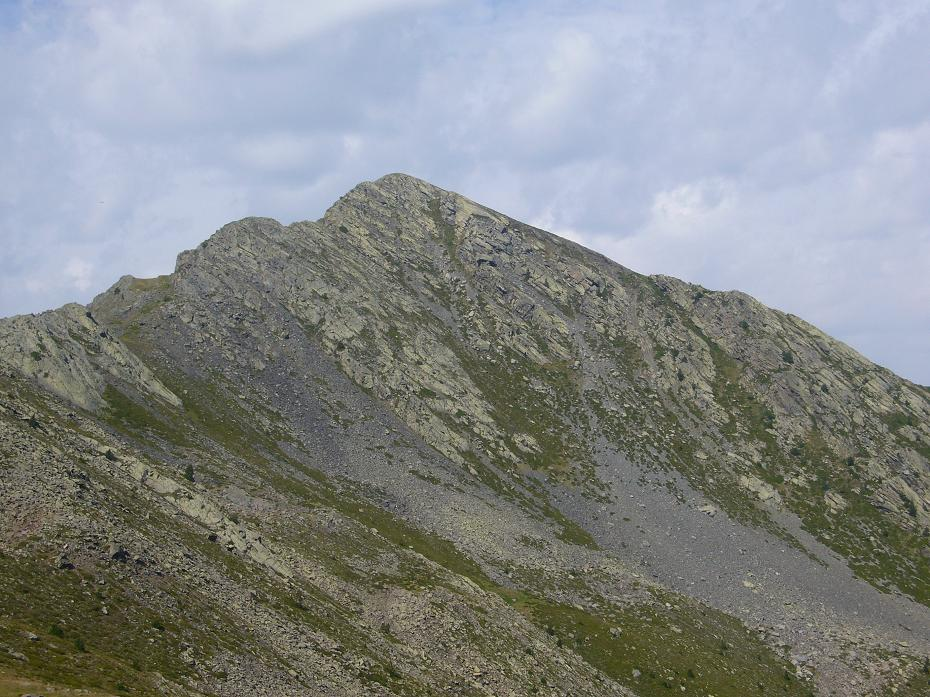 Vessant nord-oriental del Tuc de la Comamarja; la Vall de Boí, Alta Ribagorça, Catalunya